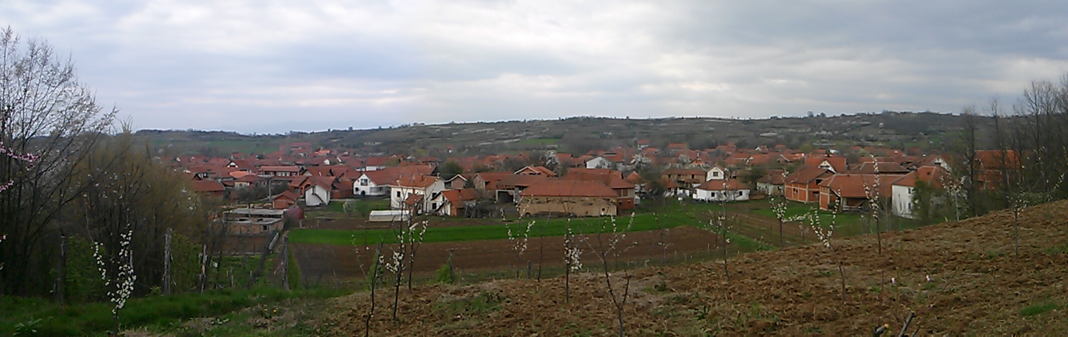 Srpski (latinica): Nakrivanj, Leskovac